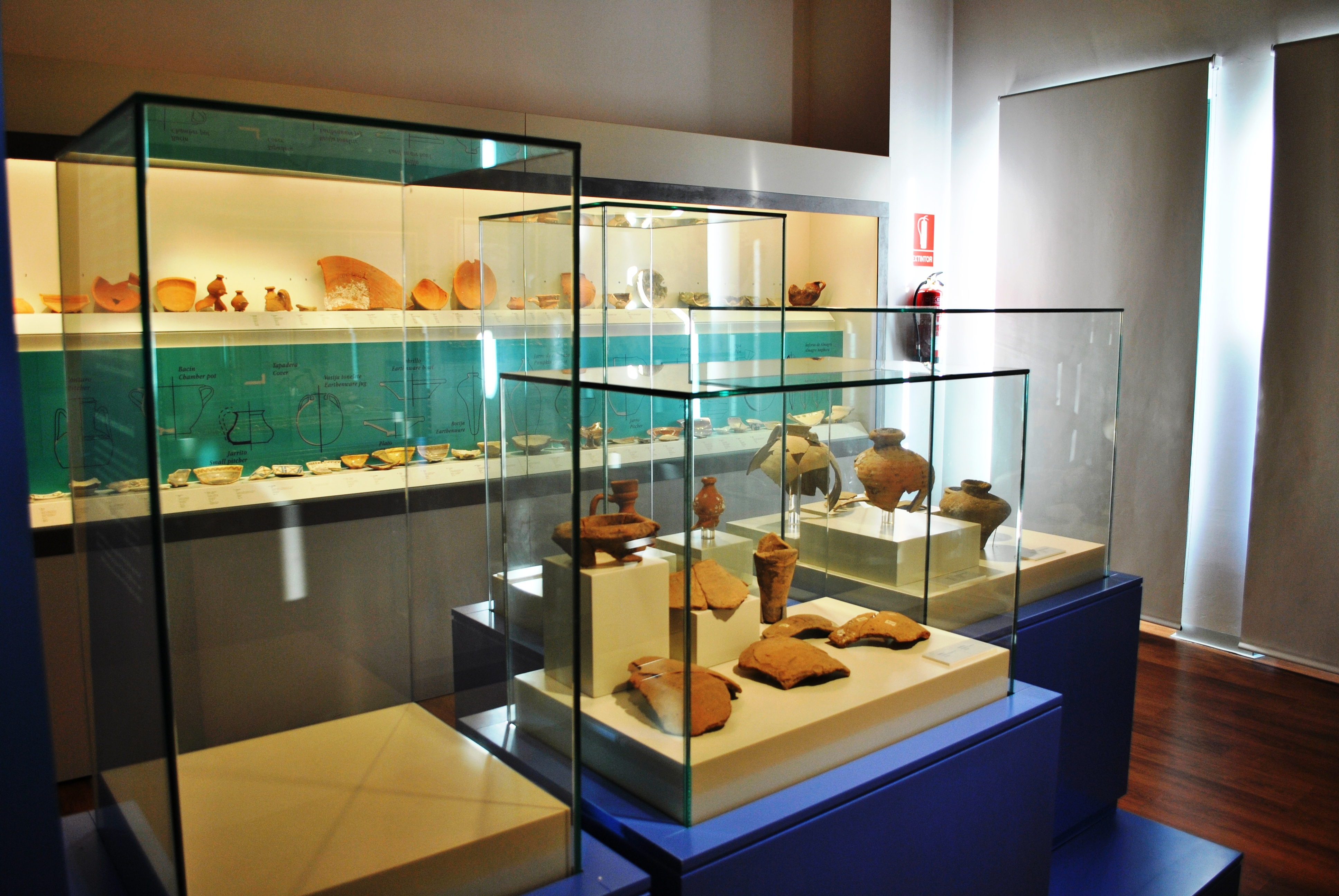 Véxase o título e as categorías